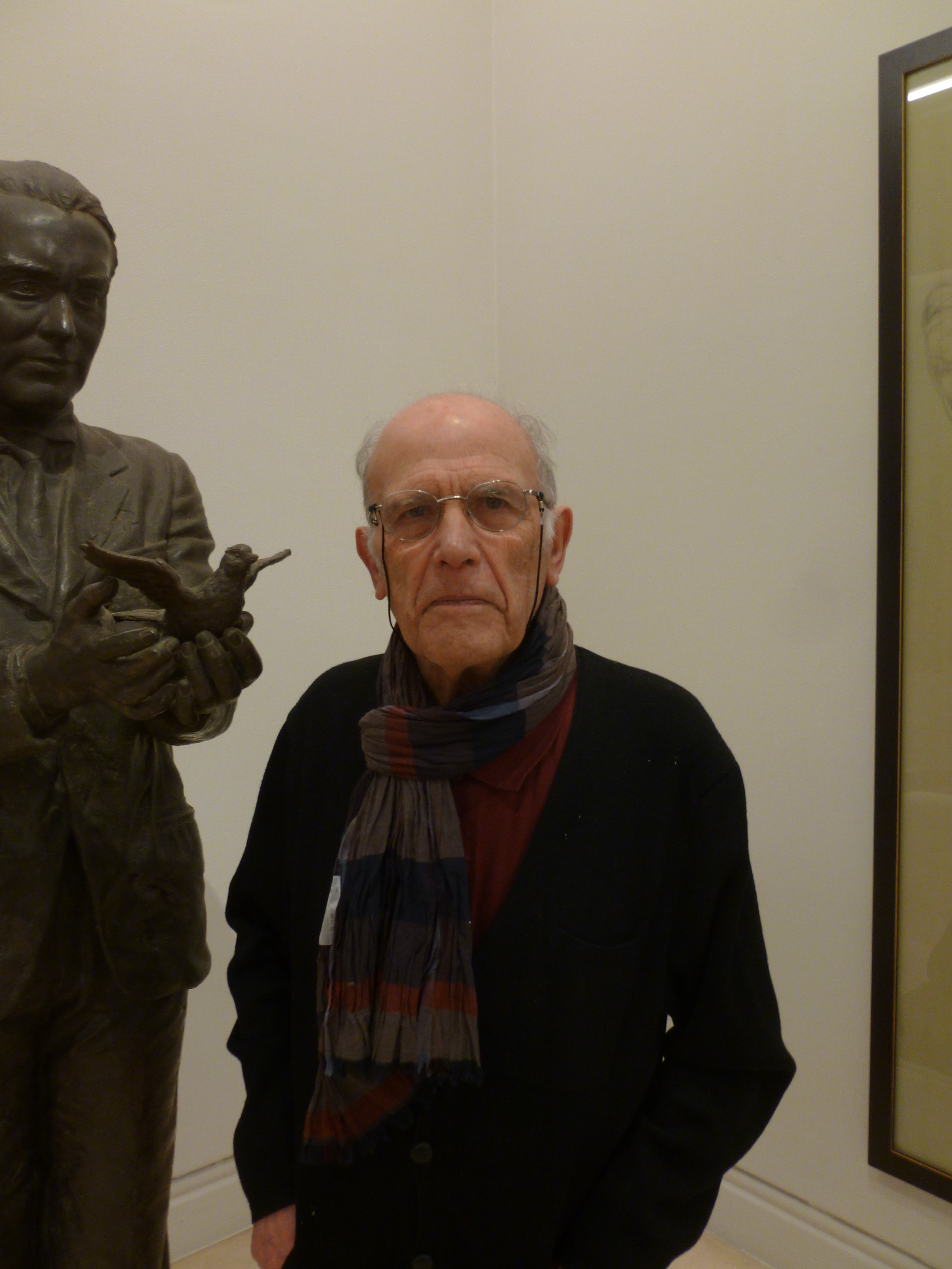 Julio López Hernández durante la exposición “El camino inverso”, organizada por la Real Academia en colaboración con la Fundación Banco Santander.